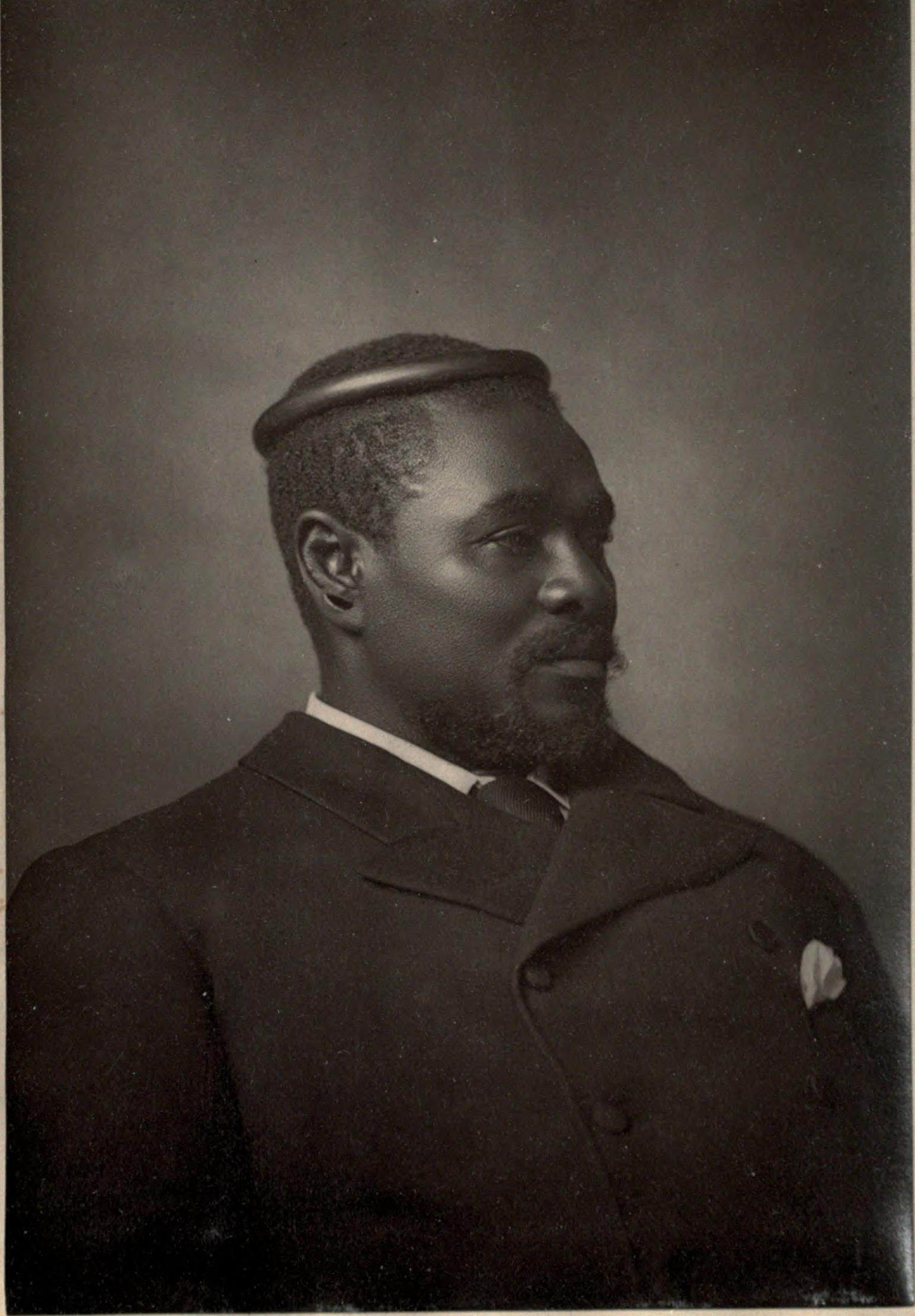 Cetshwayo ka Mpande